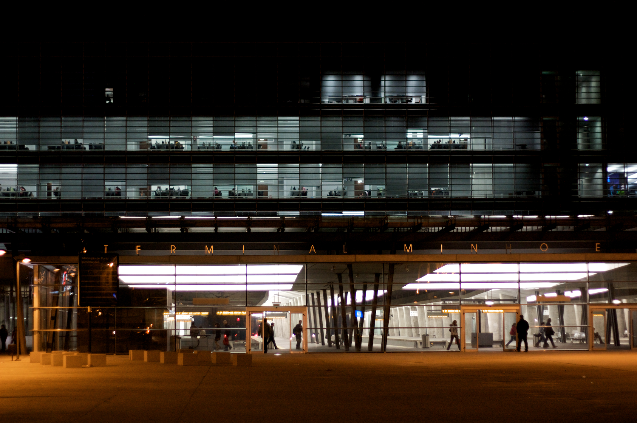 Tipo: EC [Estação de Concentração] Terminal Minho e Douro Local: Porto [Linha do Minho, PK 0,0 • Linha do Norte, PK 336] Data e hora: 22 de Dezembro de 2008 [20h28]